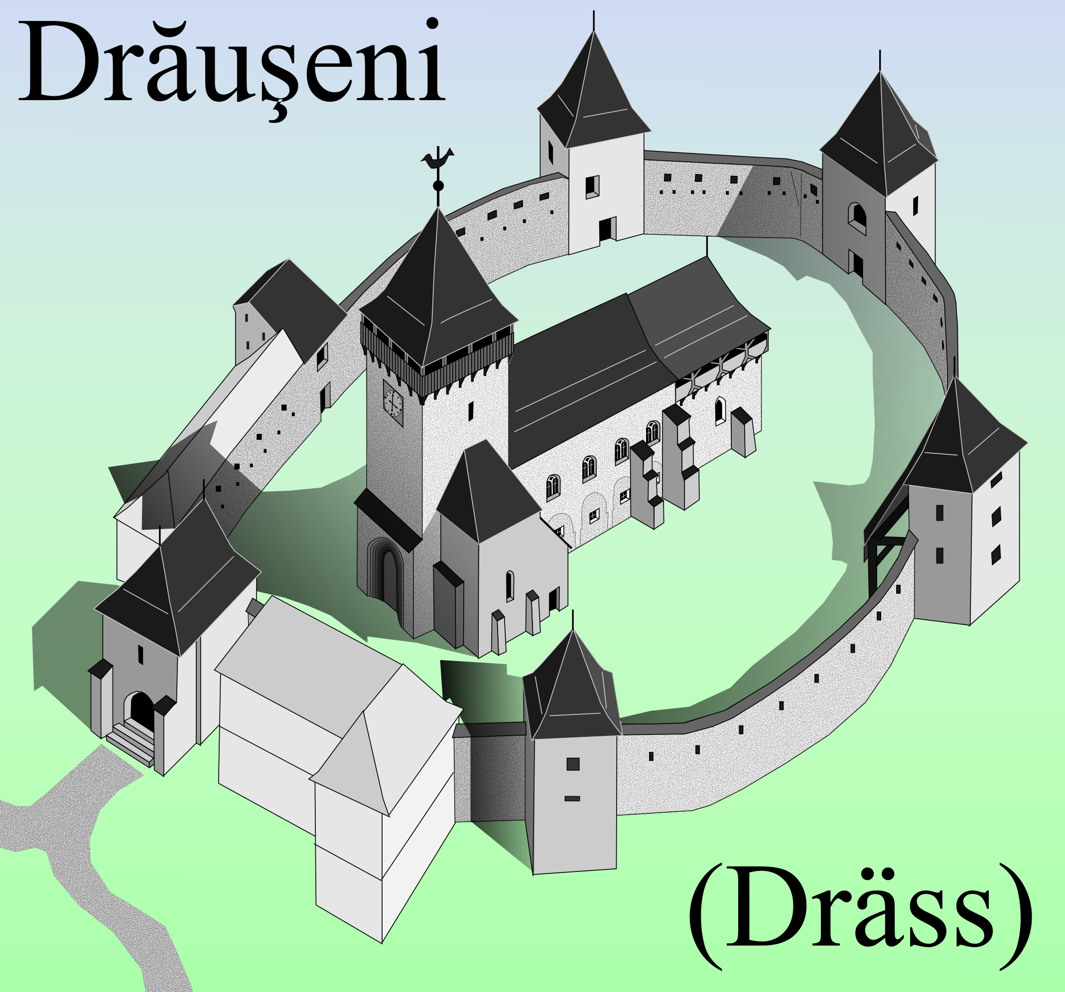 Biserica fortificata din Drauseni.